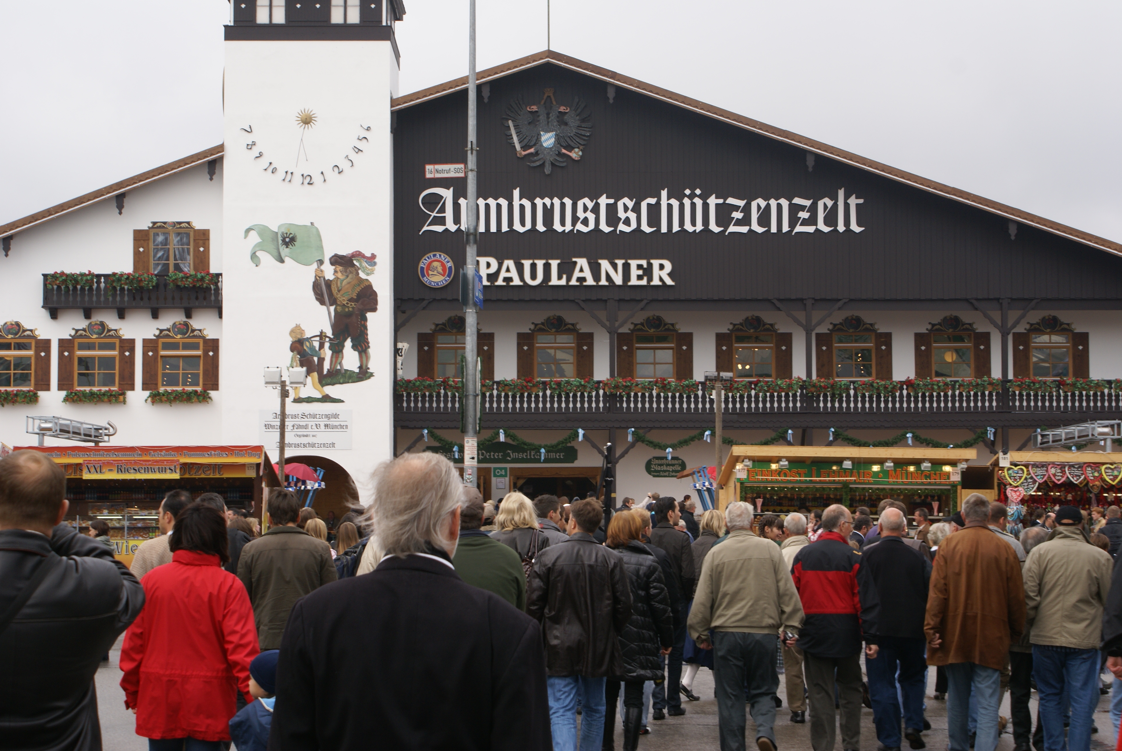 Oktobrfest 2008 Paulaner